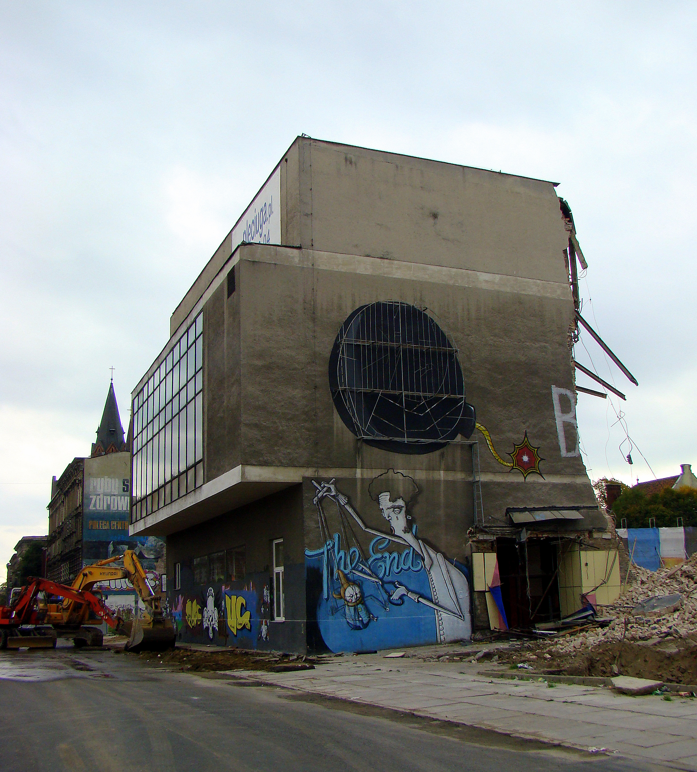 Teatr Lalek Pleciuga, (rozbiórka), Szczecin, Polska